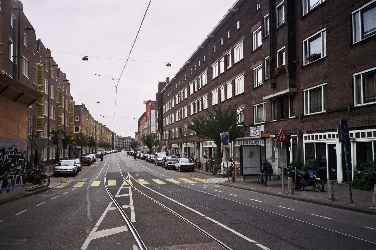 Witte de Withstraat, Amsterdam